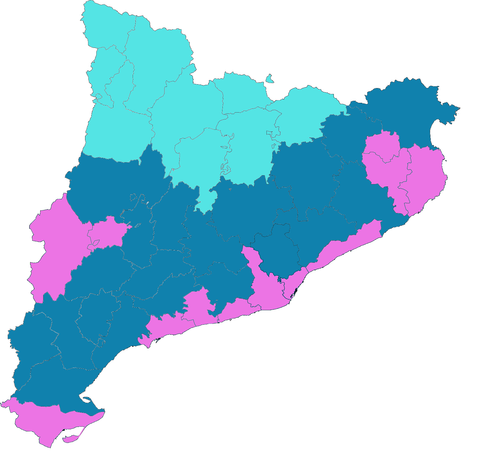 Treball propi. Nevades a Catalunya.